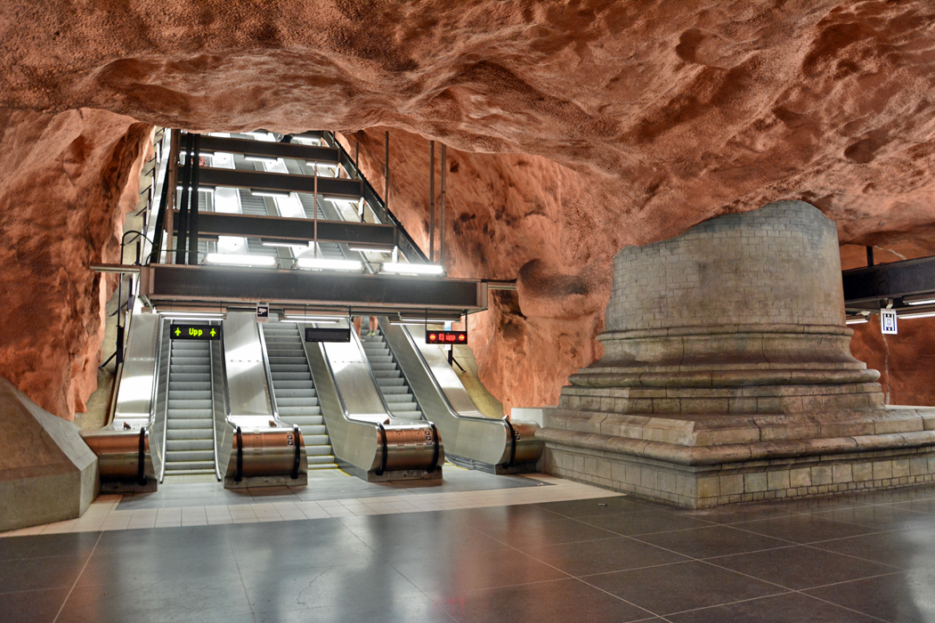 Metro Stockholm, Station Rådhuset